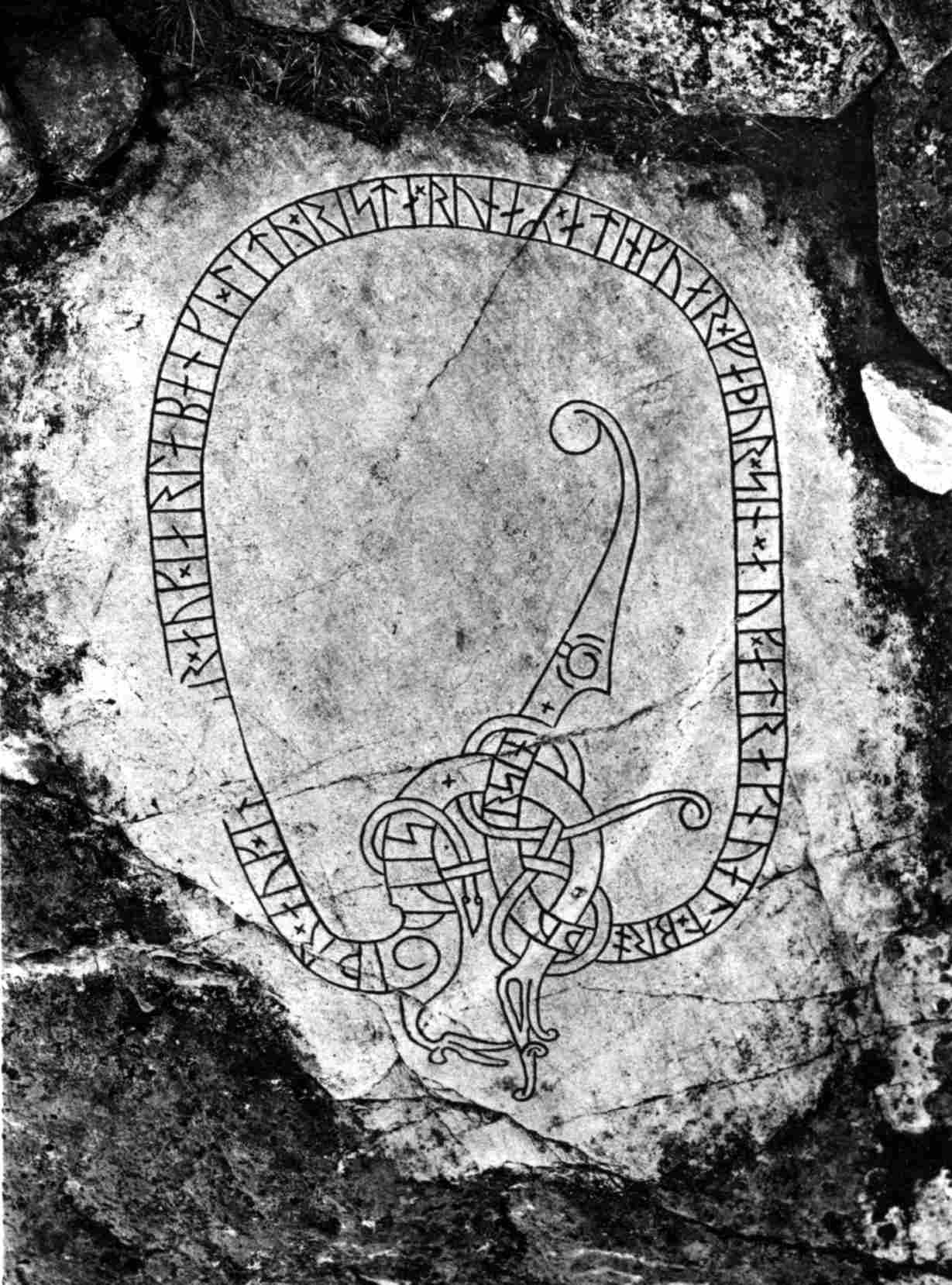 Runestone picture